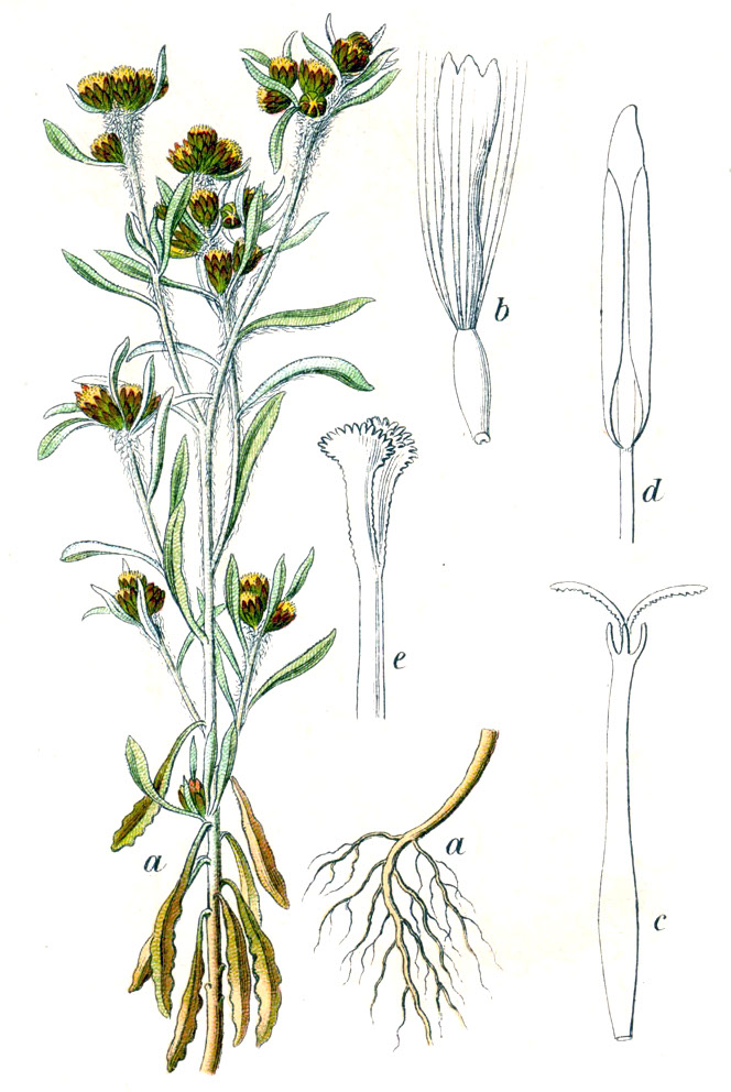 Gnaphalium uliginosum L. Original Caption Sumpf-Ruhrkraut, Gnaphalium uliginosum